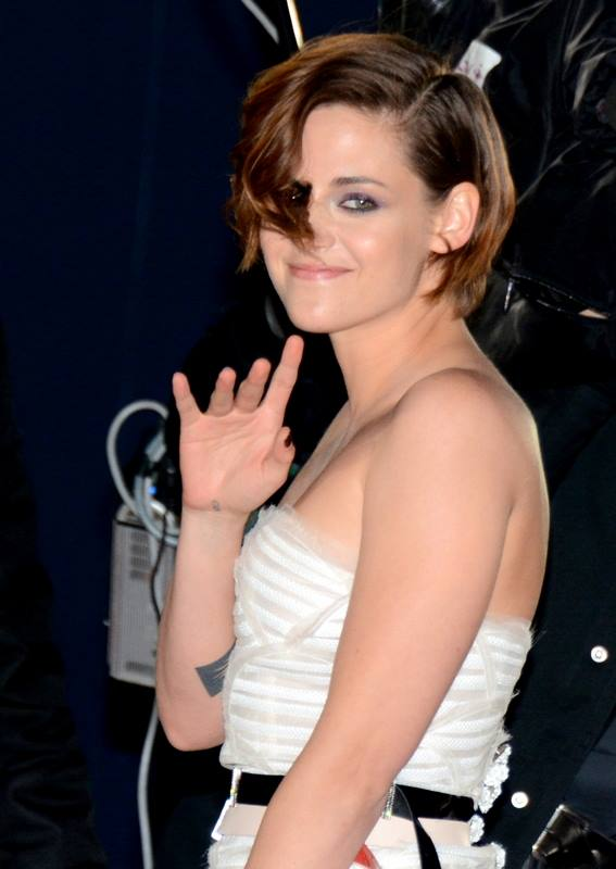 Kristen Stewart à la cérémonie des César